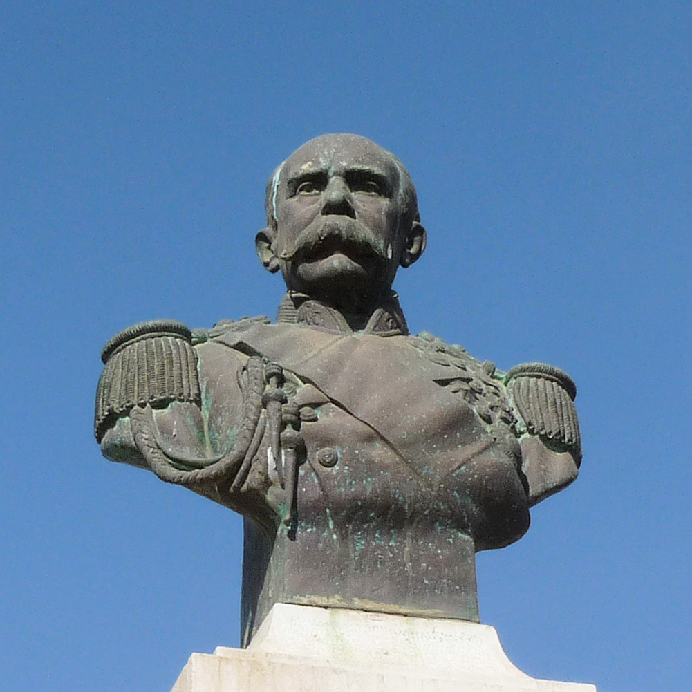 Praia (Cap-Vert) : monument à la mémoire du gouverneur et vice-amiral Caetano Alexandre de Almeida e Albuquerque, érigé en 1926